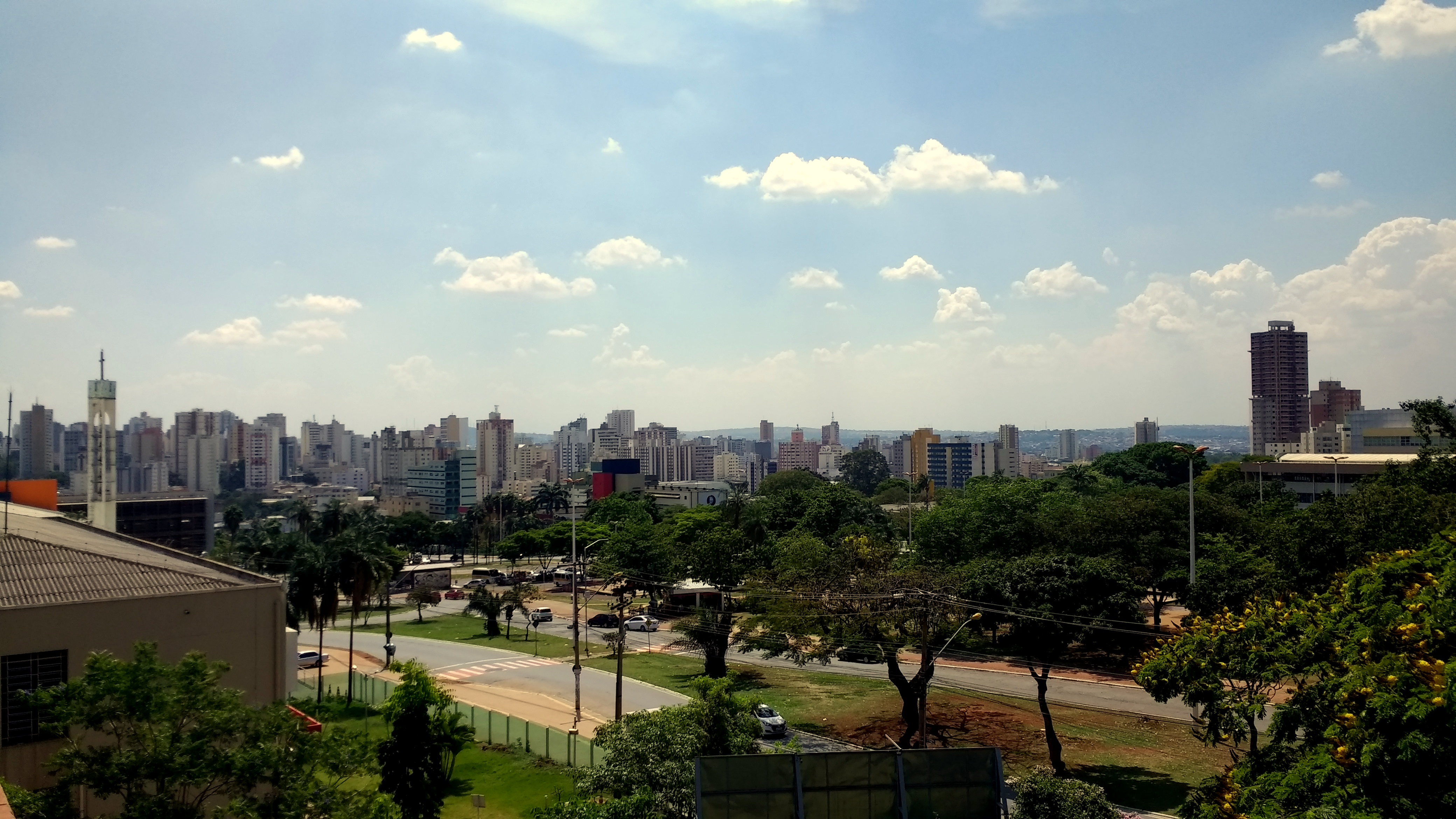 Observação da Praça Universitária no bairro Universitário em Goiânia a partir do prédio do Museu Antropológico.